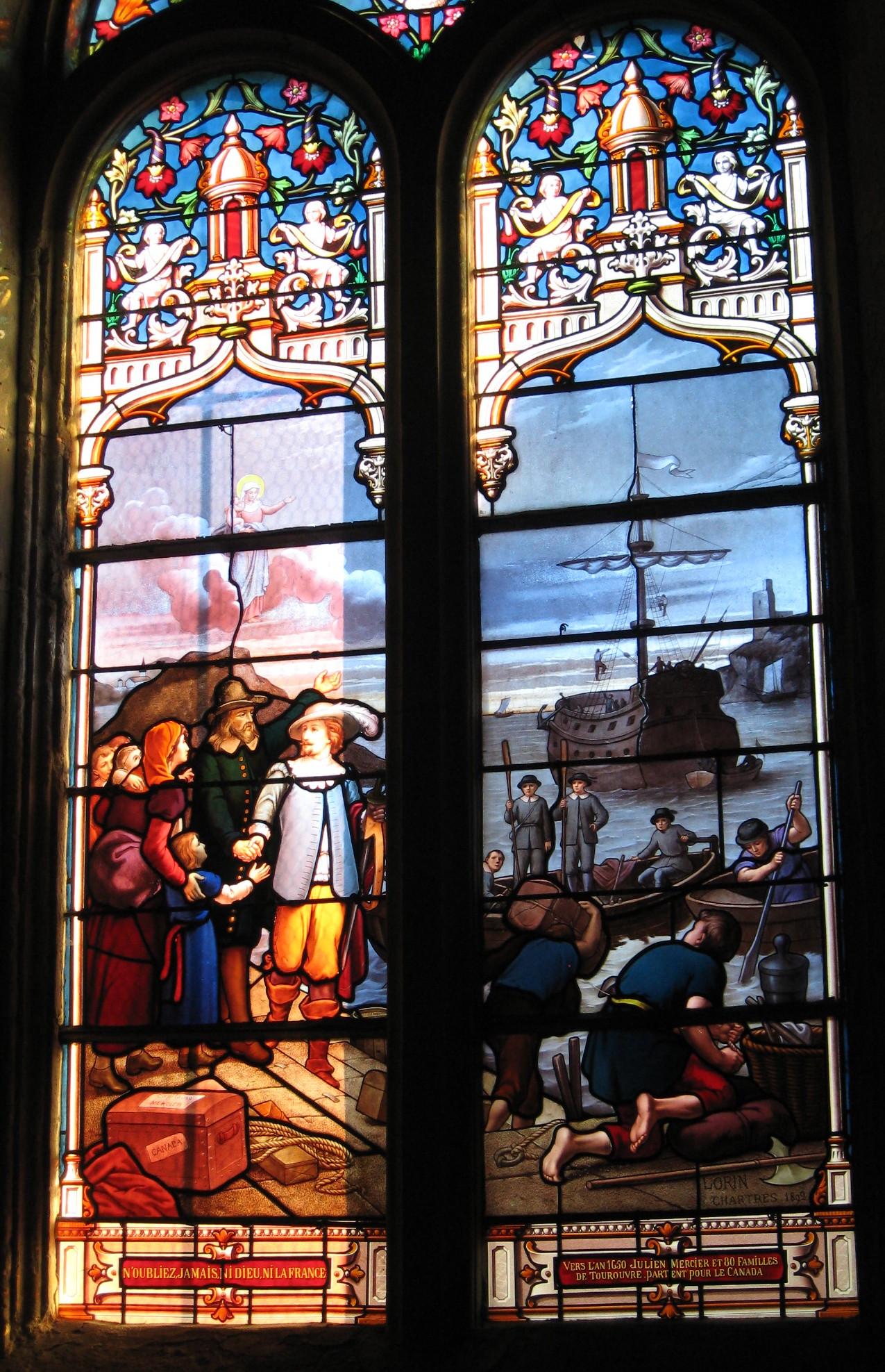 Vitrail relatant le départ de Julien Mercier pour l'Amérique. Il a été installé dans l'église de Tourouvre, financé par un de ses descendants : Honoré Mercier (Premier Ministre du Québec de 1887 à 1891). Signature : "LORIN CHARTRES 1892". Vitrail évoquant l'émigration percheronne au Québec. .